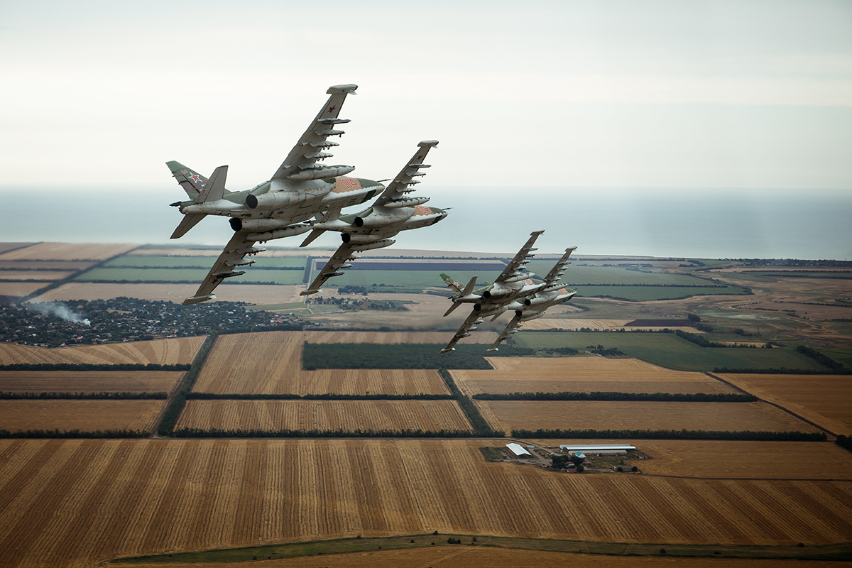 Выполнение задач по уничтожению объектов ПВО условного противника экипажами штурмовиков Су-25 960-го штурмового авиационного полка Южного военного округа (Краснодарский край).